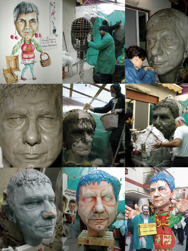 Creazione di una testa in cartapesta satirica di Nichi Vendola, dal bozzetto all'opera finale.